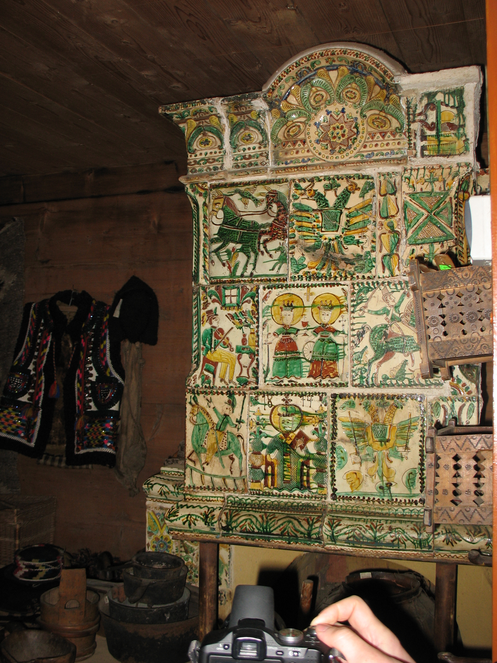 Україна, Івано-Франківська обл., Верховинський р-н, с.Криворівня. Садиба-музей Івана Франка. Груба, обкладена старовинними кахлями XVIII або XIX ст.